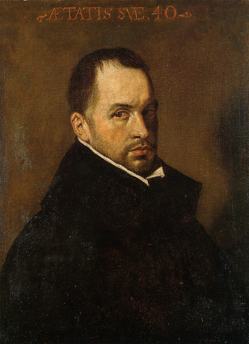 Retrato de un clérigo de 40 años (supuesto retrato de Francisco de Rioja).